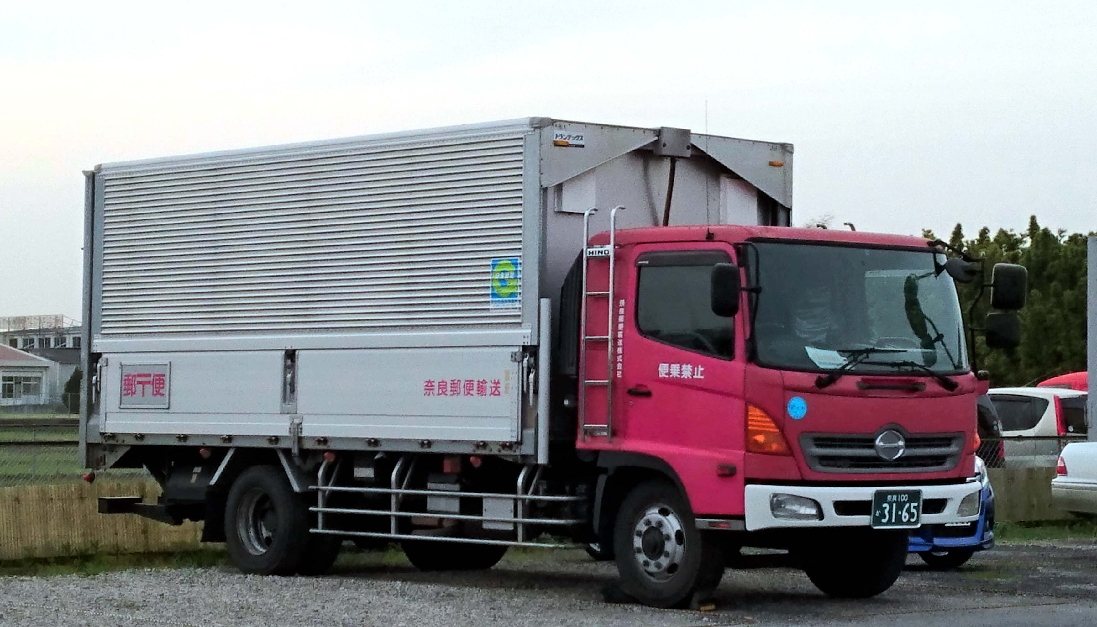 奈良郵便輸送株式会社のトラックです。